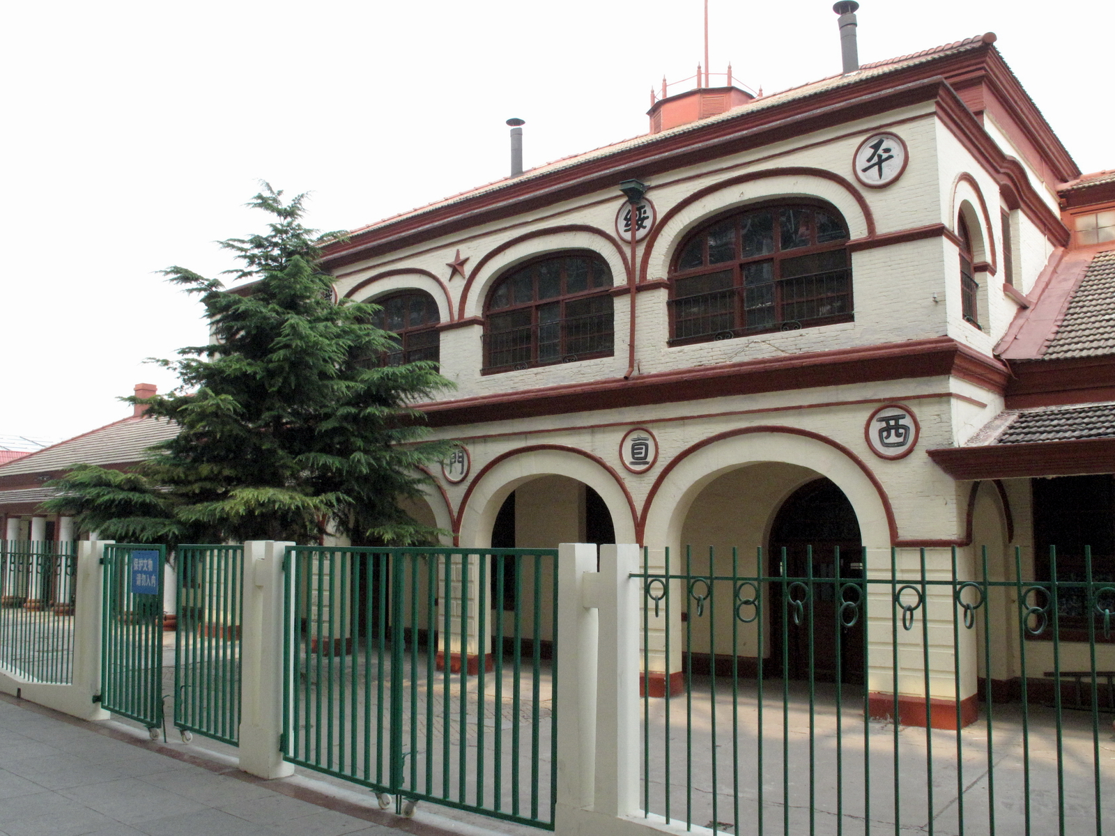 北京北站旧站房。1909年京张线铁路通车时正式投入运营，站房上有:“平绥铁路西直门车站”字样。1995年成为北京市文物保护单位。